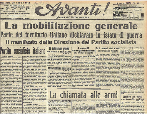 prima pagina dell'Avanti del 23 maggio 1915